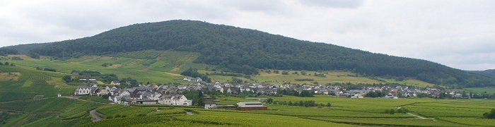 Osann-Monzel. Panorama vom Ortsteil Monzel, im Hintergrund der Hüttenkopf. Aufgenommen aus östlicher Richtung beim Aufstieg zum Brauneberg